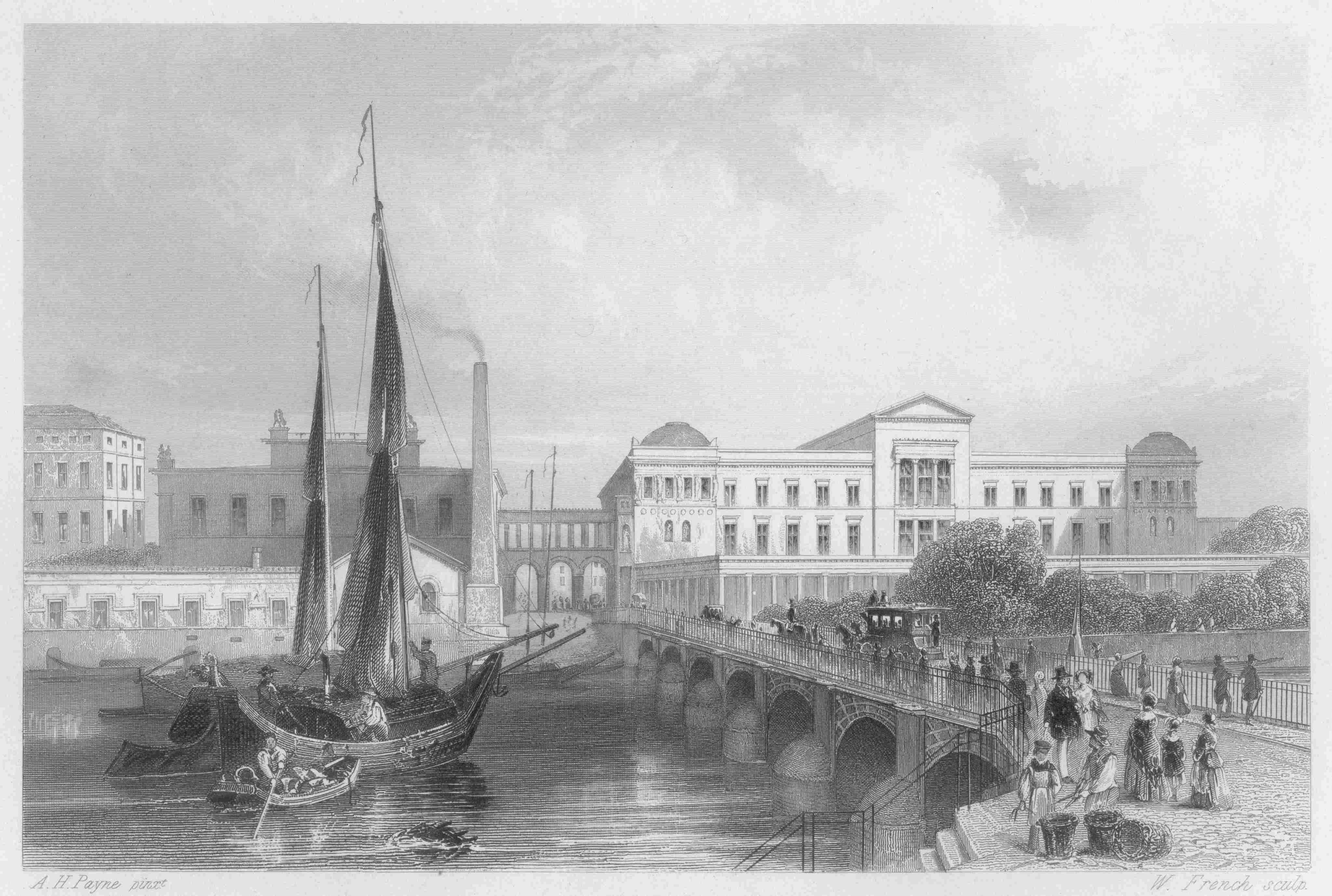 Berlin Neues Museum, Ansicht mit der Friedrichsbrücke um 1850, Stahlstich